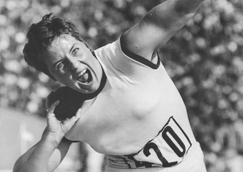 Margitta Gummel ADN-ZB Kluge 27.06.1971 Leipzig:XXII.DDR-Meisterschaften der Leichtathleten (3.Tag) -Mit 19,38 m gewann Olympiasiegerin Margitta Gummel das Kugelstoßen der Frauen-Sie erkämpfte damit den 1 000. Meistertitel in der Geschichte der DDR-Leichtathletik.